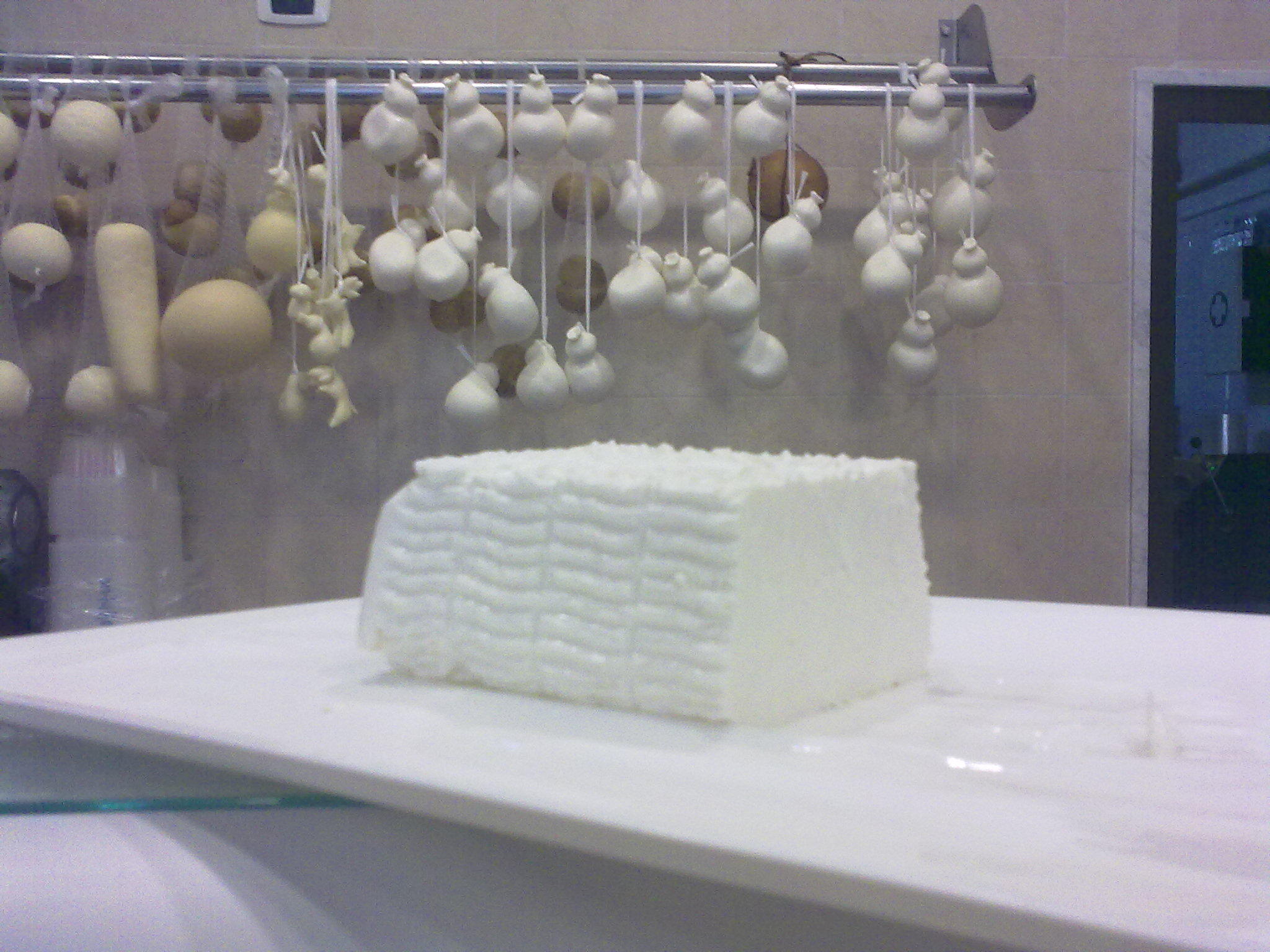 Il fallone di Gravina all'interno di un caseificio di Gravina